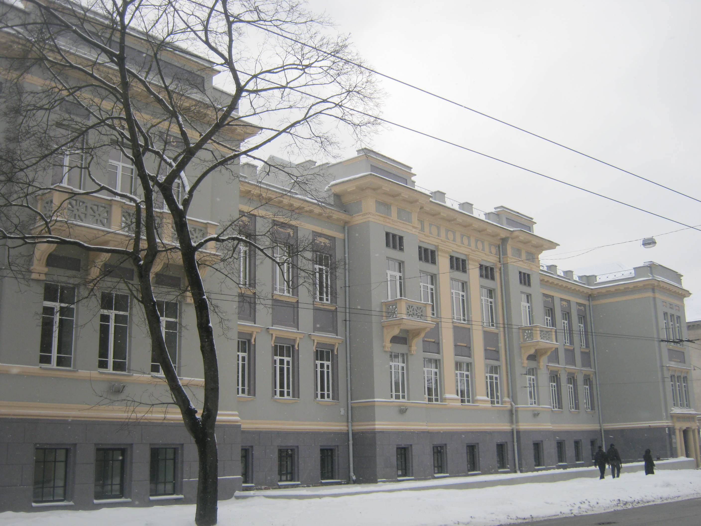 Vilniaus Gedimino technikos universitetas